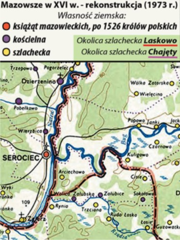 Mapa okolic Arciechowa, Serocka, Zegrza z XVI w. (zrekonstruowana)